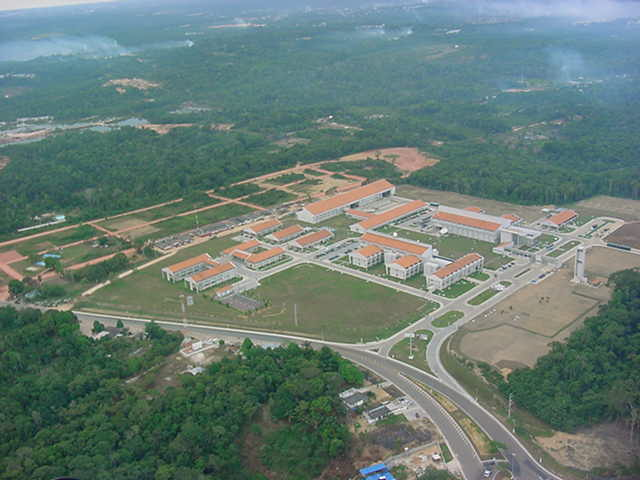 Conjunto do Projeto SIVAM na cidade de Manaus.